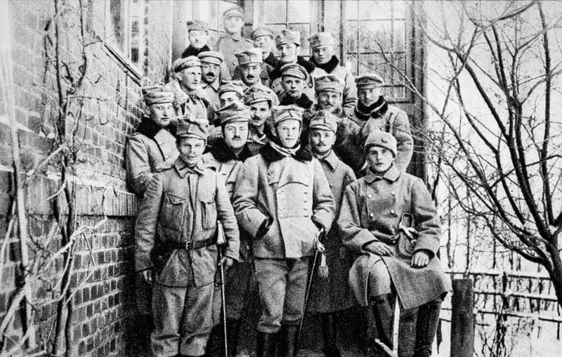 Grupa oficerów w Kętach. M.in. (Sław-Rowecki, Stanisław Sław-Zwierzyński, Jan Jagmin-Sadowski, Tadeusz Trapszo, Wacław Styk-Stachiewicz itd.)